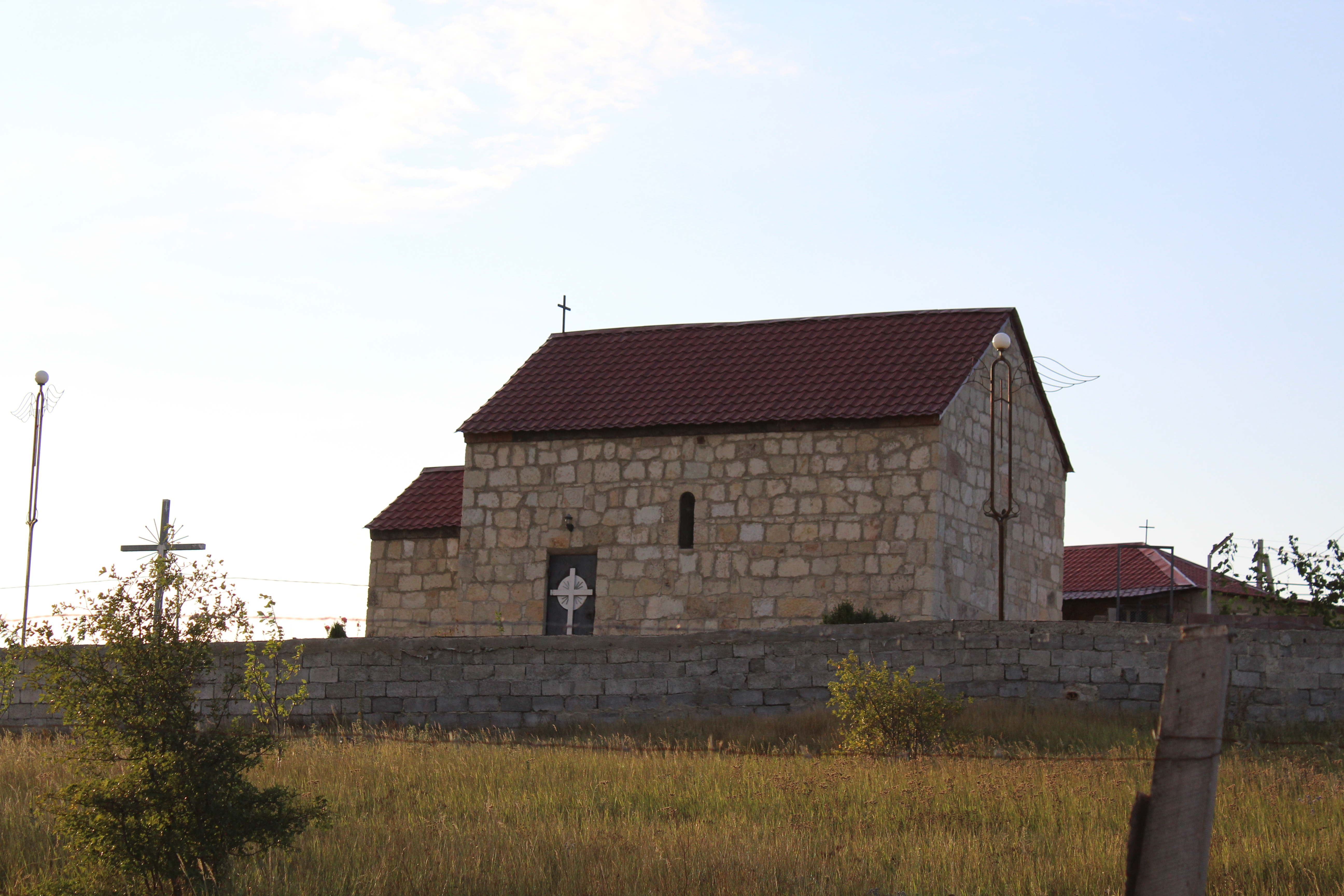 ნიკორთის ღვთისმშობლის შობის ეკლესია